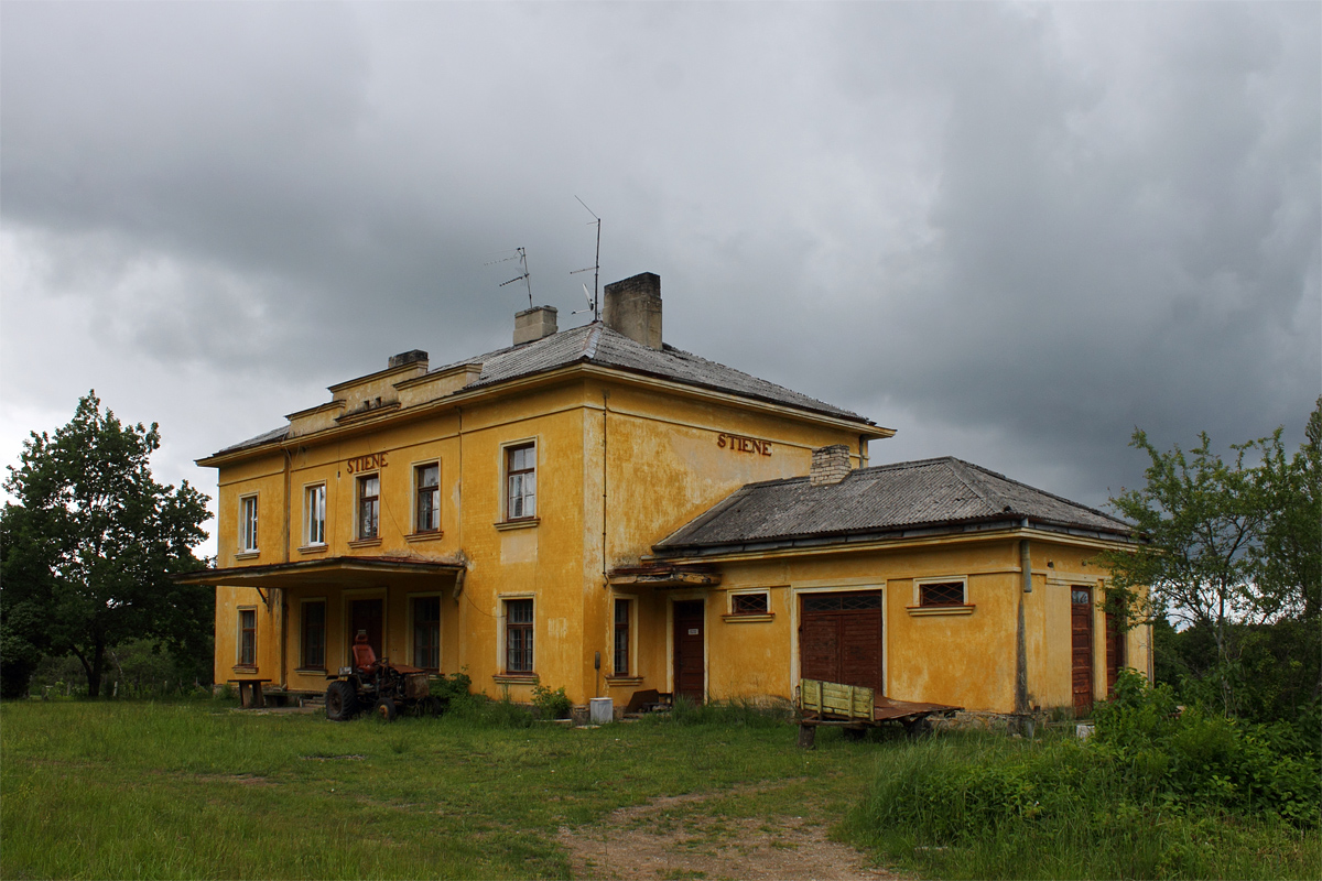 Stienes stacijas ēka